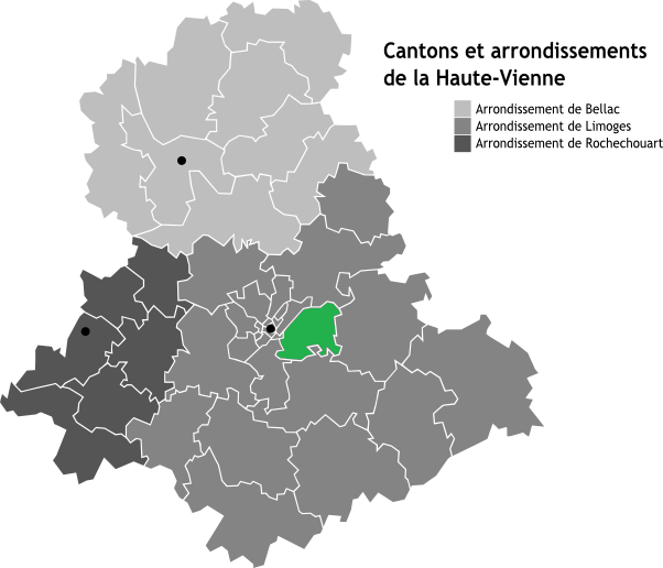 Canton de Limoges-Panazol, Limousin, France en Carte des arrondissements de la Haute-Vienne